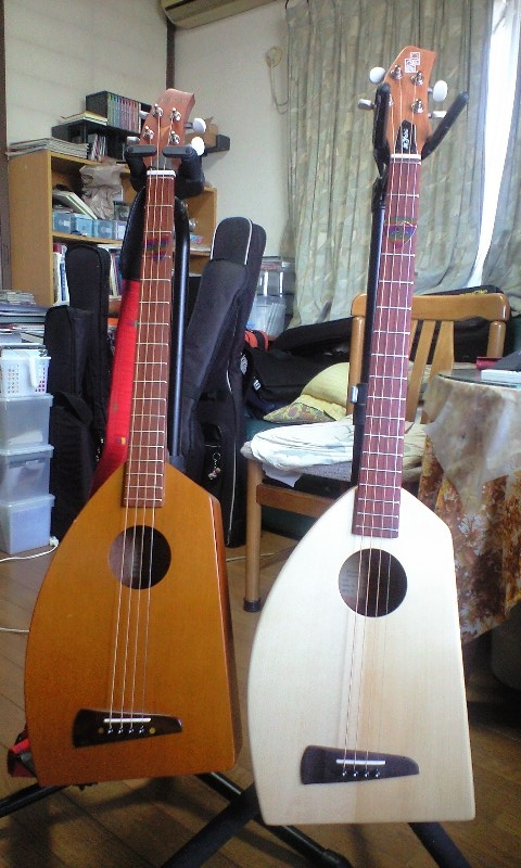 一五一会・音来(にらい)、初期型と2009年の新型。2009年自宅にて。